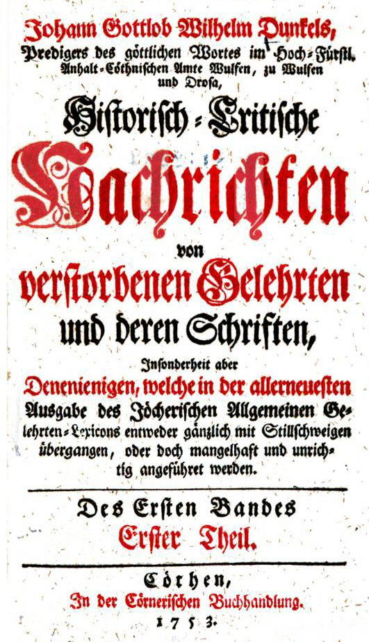 Title page of Johann Gottlob Wilhelm Dunkels... Historisch-critische Nachrichten Bd. 1, 1. Teil, Cöthen 1753